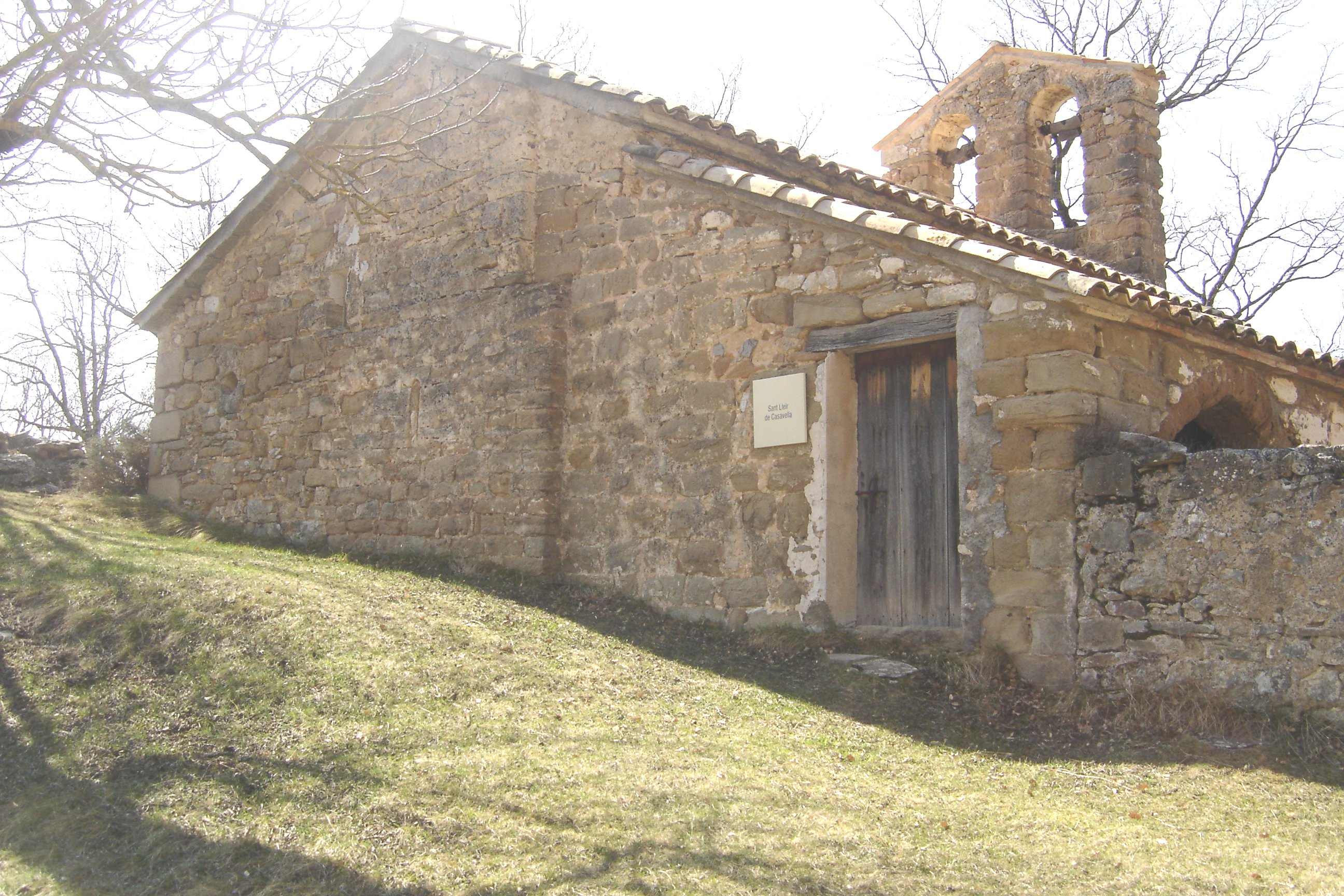 La façana de llevant de l'ermita de Sant Lleïr de Casabella, al municipi de La Coma i la Pedra, a la Vall de Lord (Solsonès).